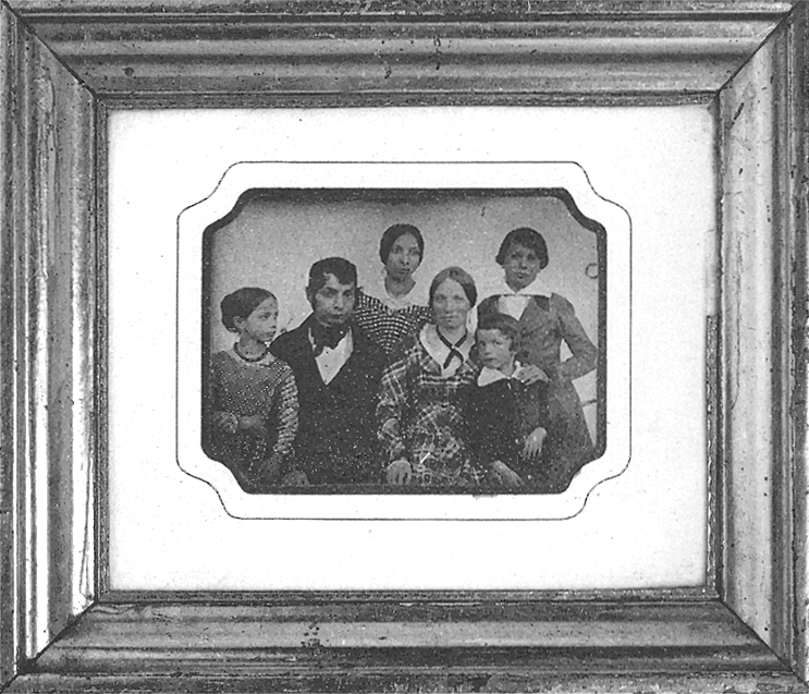 Kaufmann Karl Friedrich Baur mit seiner Familie (Daguerrotypie)